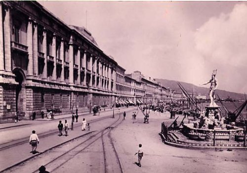 Messina: il vecchio Palazzo Municipale, costruito nel 1820 da Giacomo Minutolì: prospetto su Via Vittorio Emanuele. Fu distrutto da un incendio nel corso del terremoto del 1908.